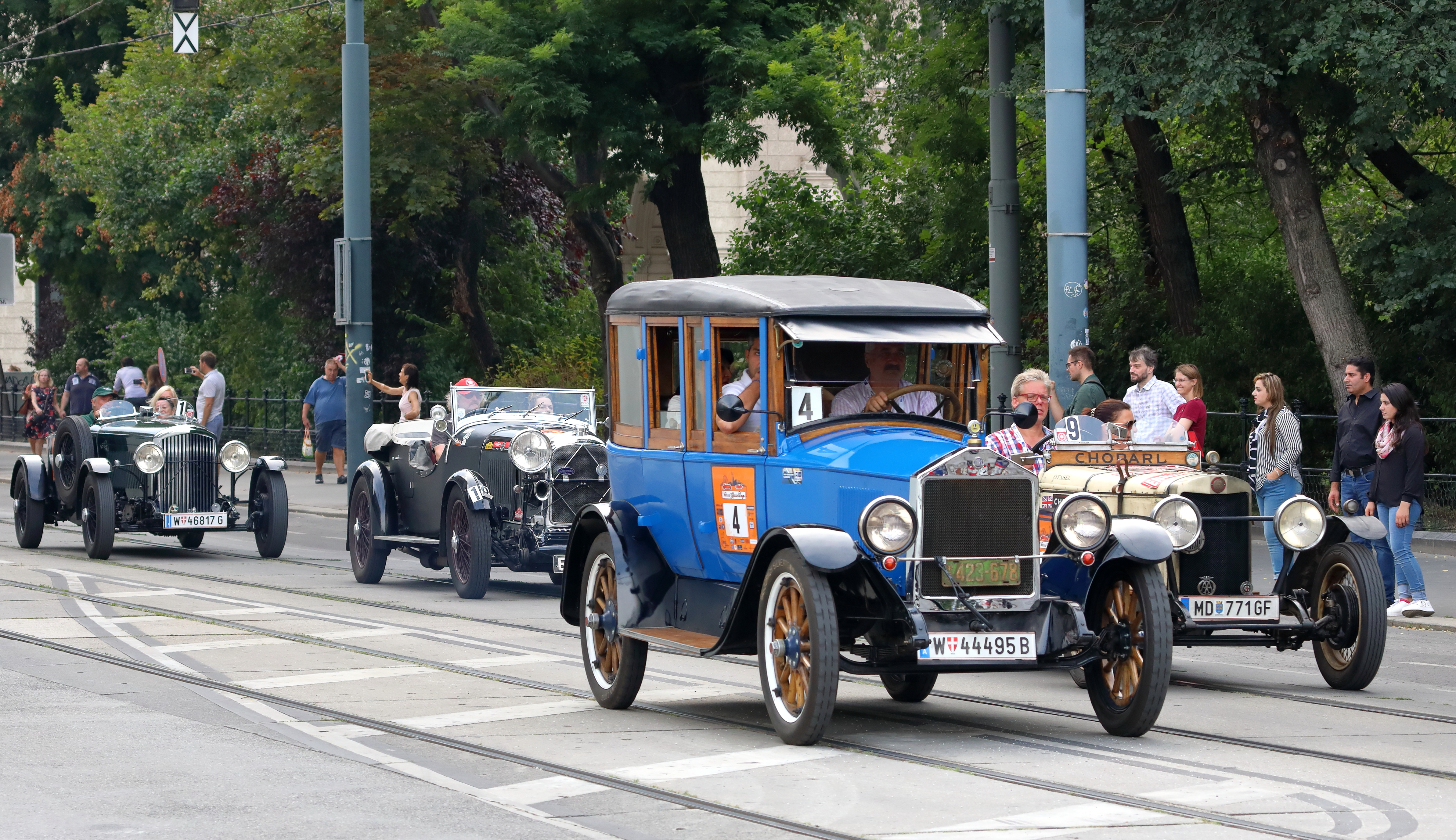 Oldtimers nächst der Adresse Rathausplatz 6 im 1. Wiener Gemeindebezirk Innere Stadt bei der Oldtimer- und Sportwagen-Parade im Zuge der Vienna Classic Days 2019.Im Vordergrund ein blauer Dort Touring (Dort Motor Car Company), Bj. 1923 (Fahrgestellnummer: 92437, Motornummer: KT24302). Motorisierung: Vierzylinder mit 2,3 Liter Hubraum und rd. 22 KW Leistung.